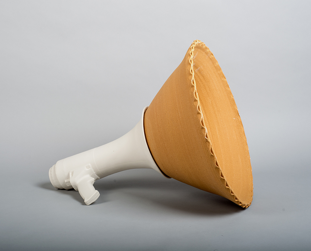 מתוך הפרויקט אזל. חומר קרמי מקומי בשילוב עם פורצלן